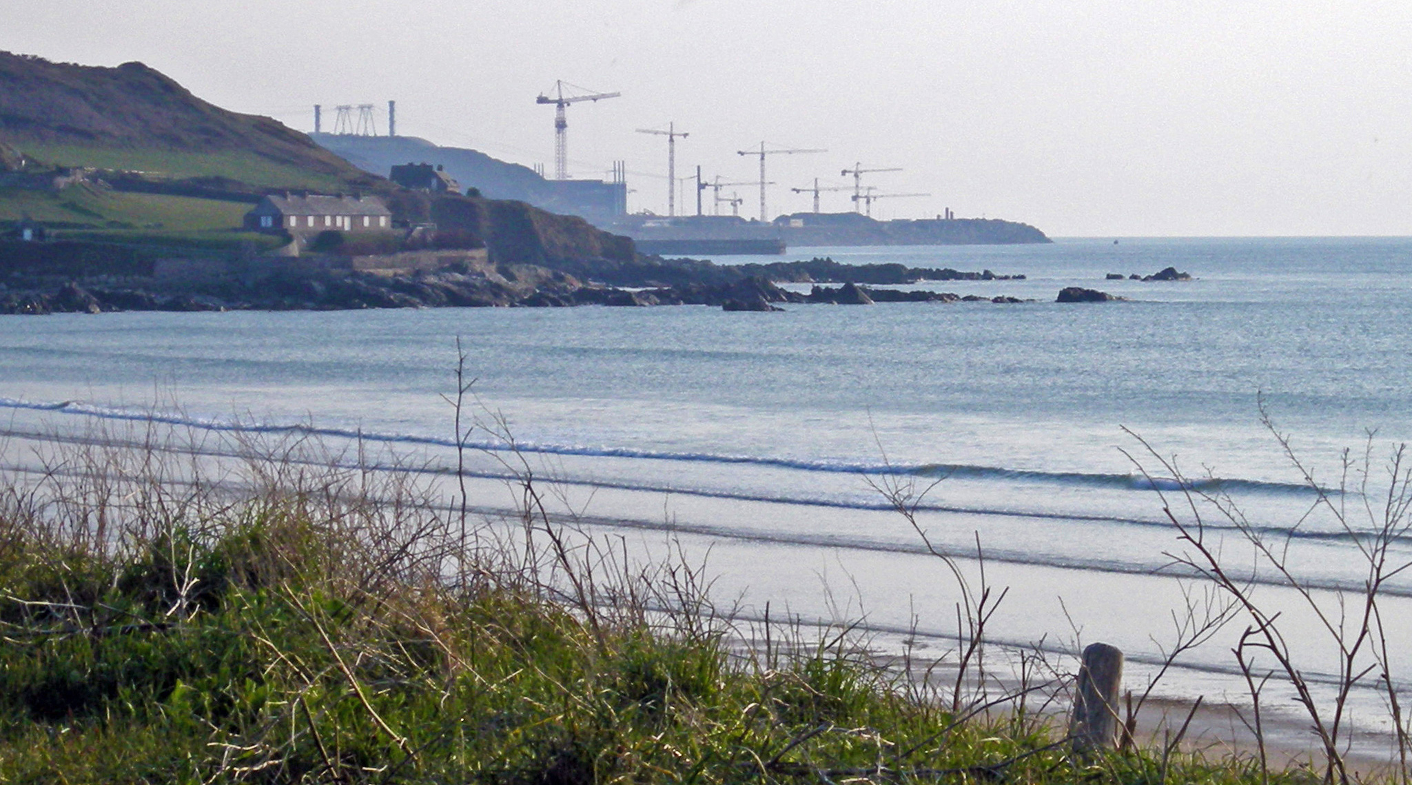 Le nouveau chantier de Flamanville vu depuis Siouville-Hague (Manche, Normandie, France)